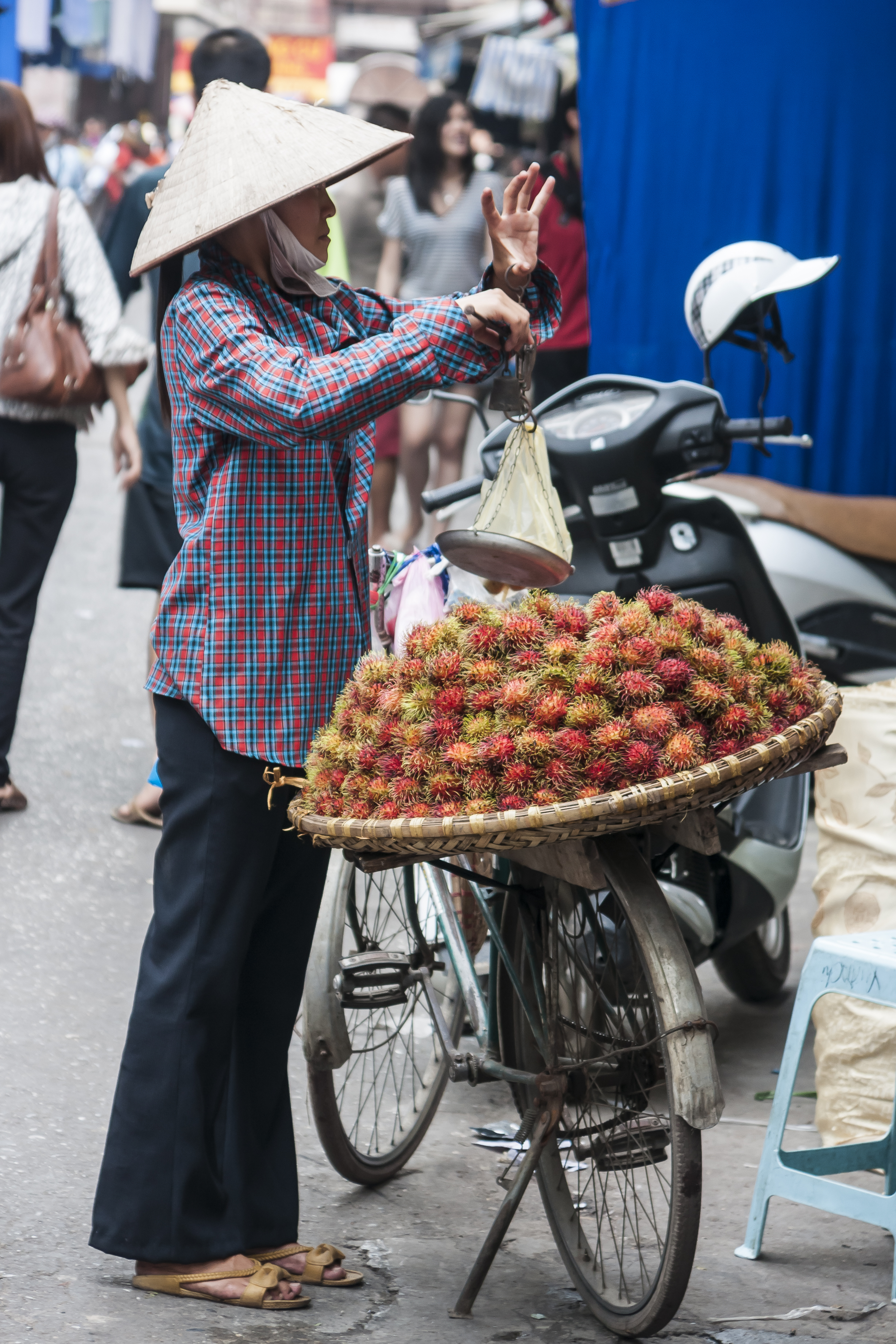 Hanoi, Vietnam: A hawker selling Nephelium lappaceum.